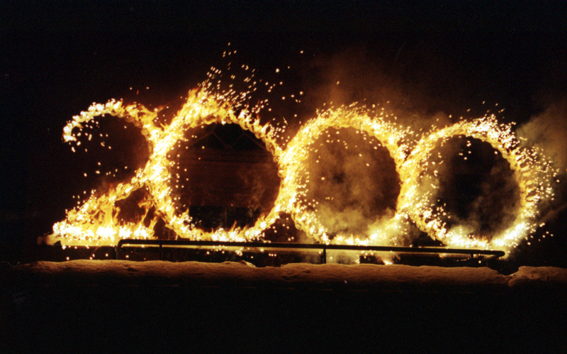 KultURKNALL 2000 Sonstiges: Zur Verfügung gestellt von Menschen Helfen e.V.